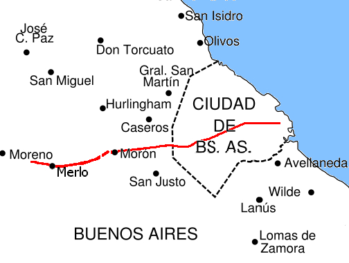 Mapa de la Avenida Rivadavia, Buenos Aires